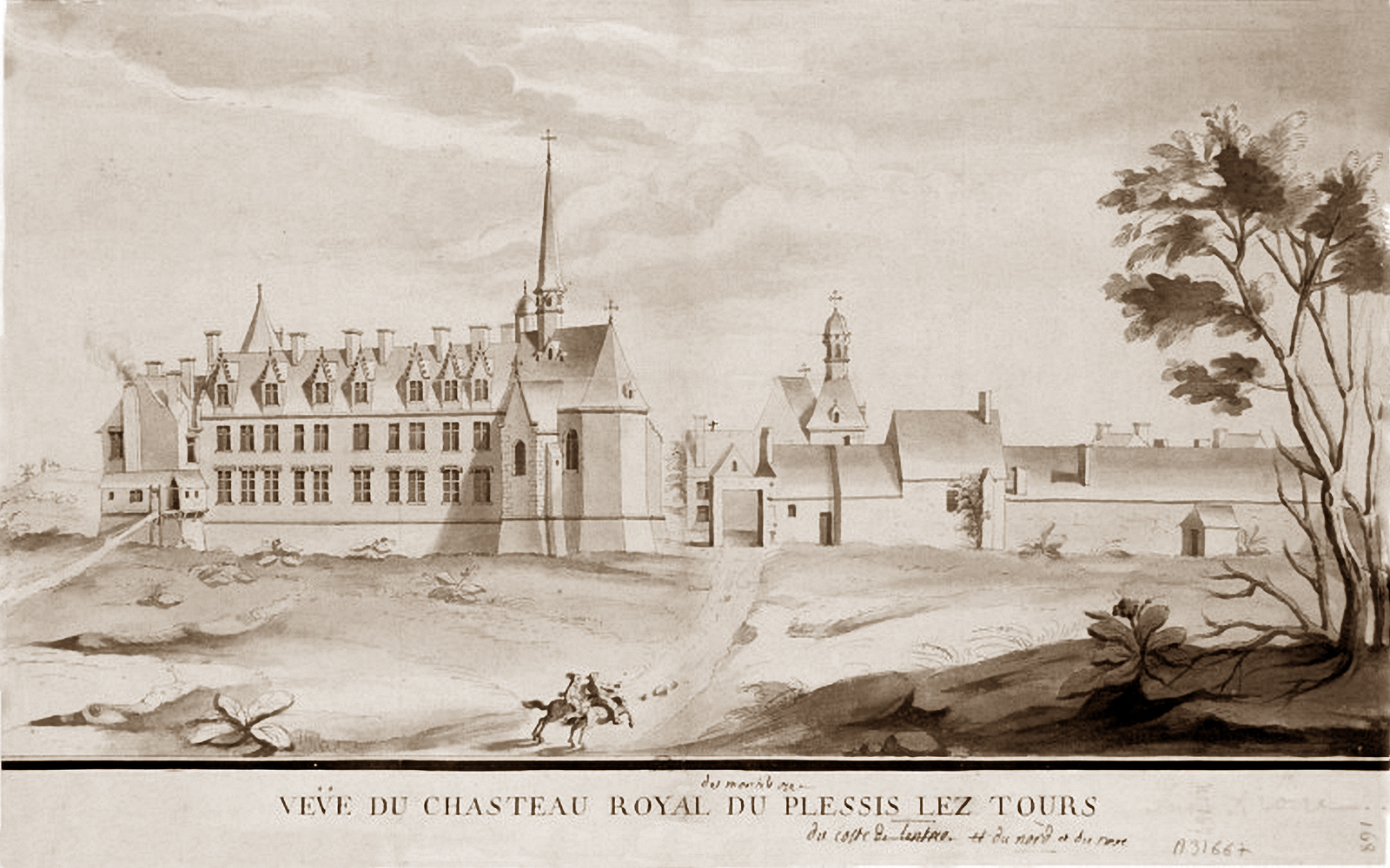 Ansicht des königlichen Schlosses von Plessis-lès-Tours, Beschriftung der Rückseite: "Ansicht der Eingangsseite des Schlosses von Plessis von Norden und vom Park